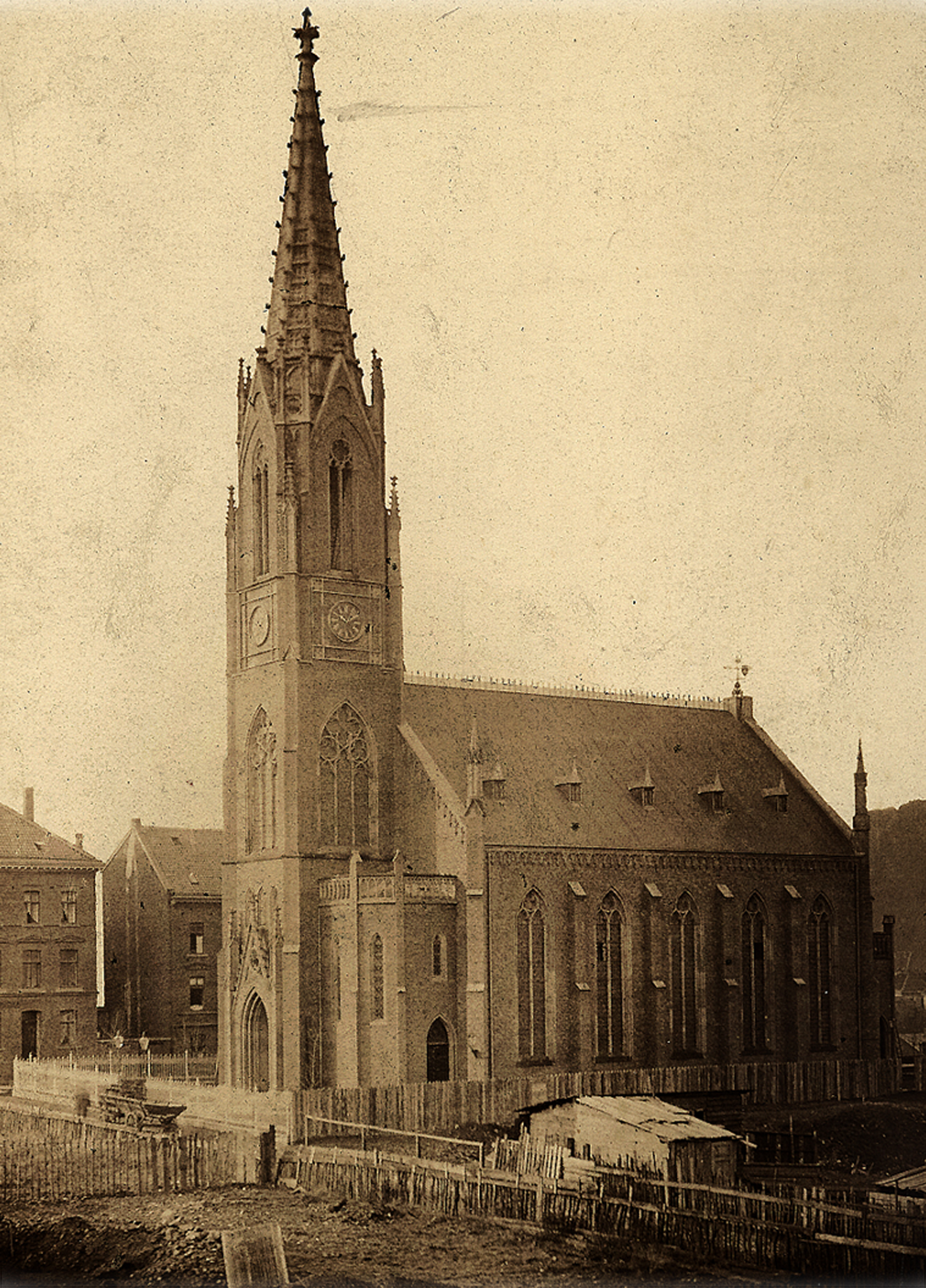 Beschreibung: Zweite protestantische Kirche Elberfeld gebaut 1979 von Hugo Altendorff Datum: 1879